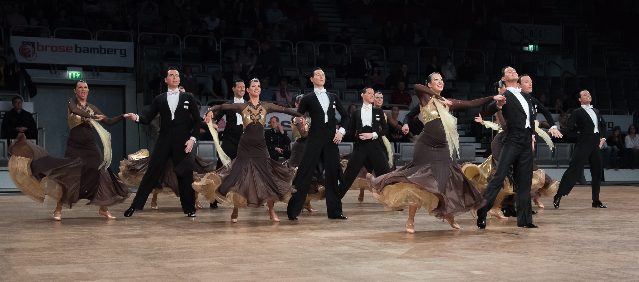 Brose Arena Bamberg,Deutsche Meisterschaften der Formationen Standard & Latein 2016,Enjoy the silence,Standard,TSC Grün-Weiß Braunschweig,Tanzsport